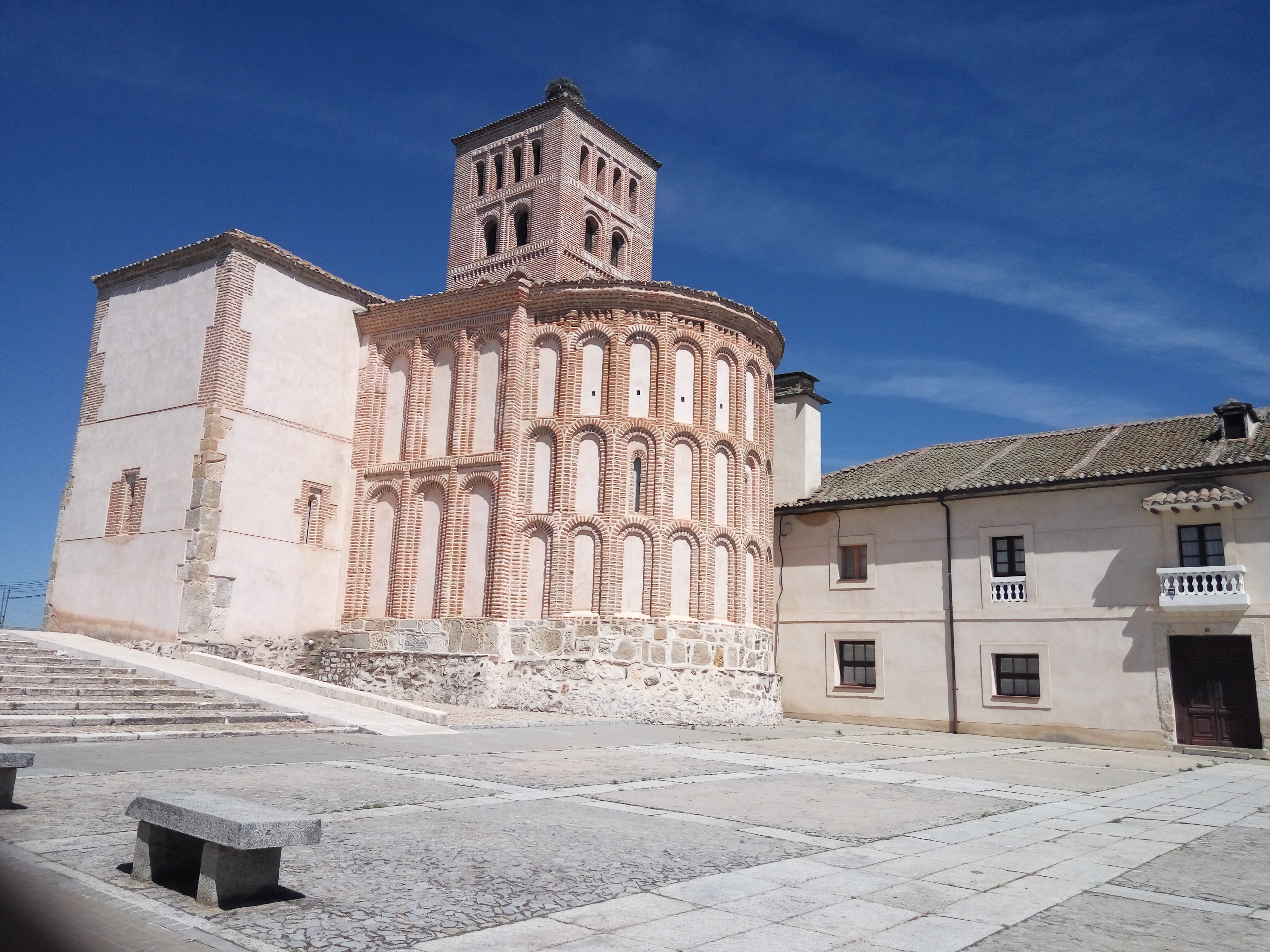 Iglesia de Carracielo del Pinar, Samboal